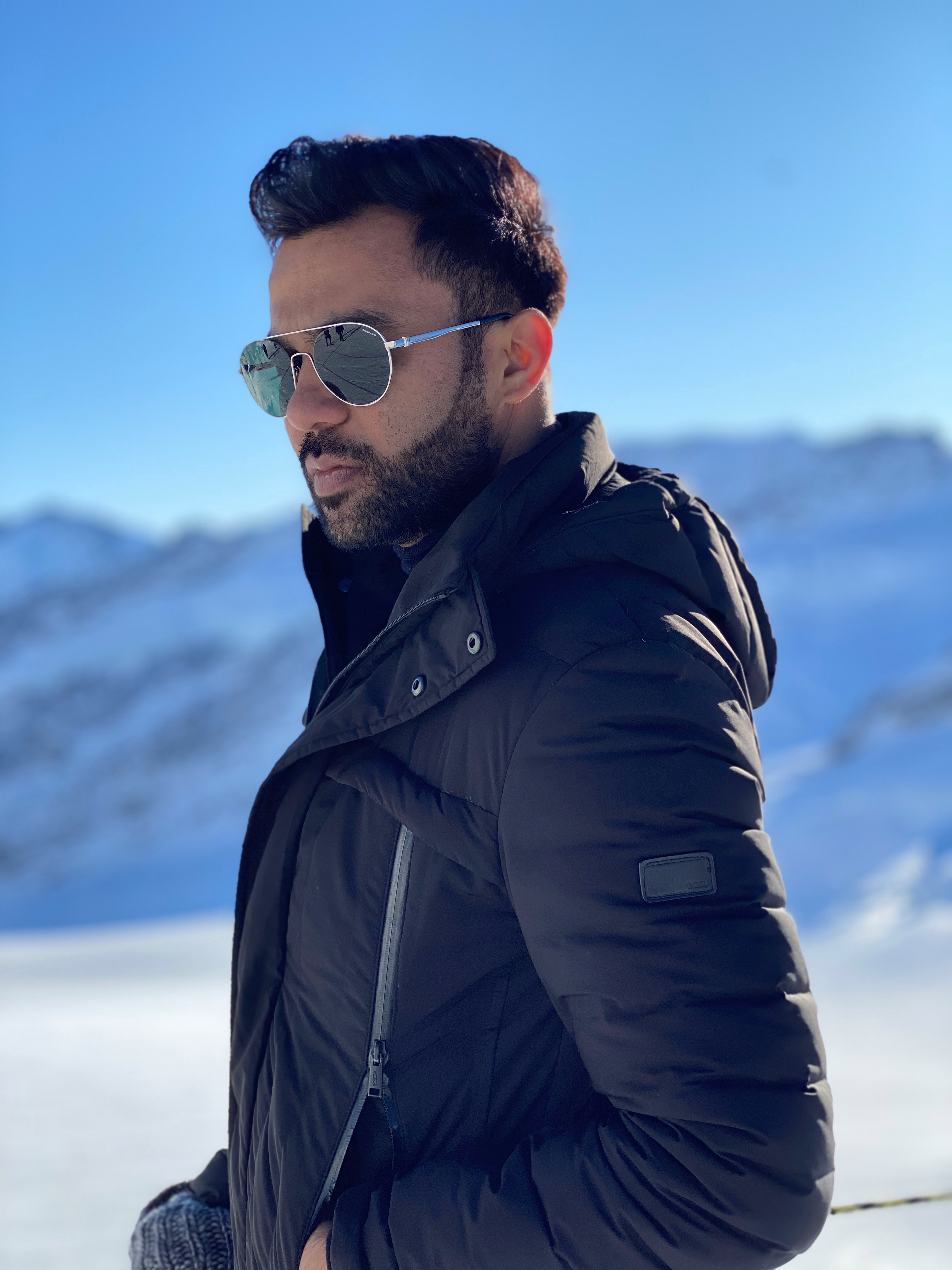 Ali Abbas Zafar